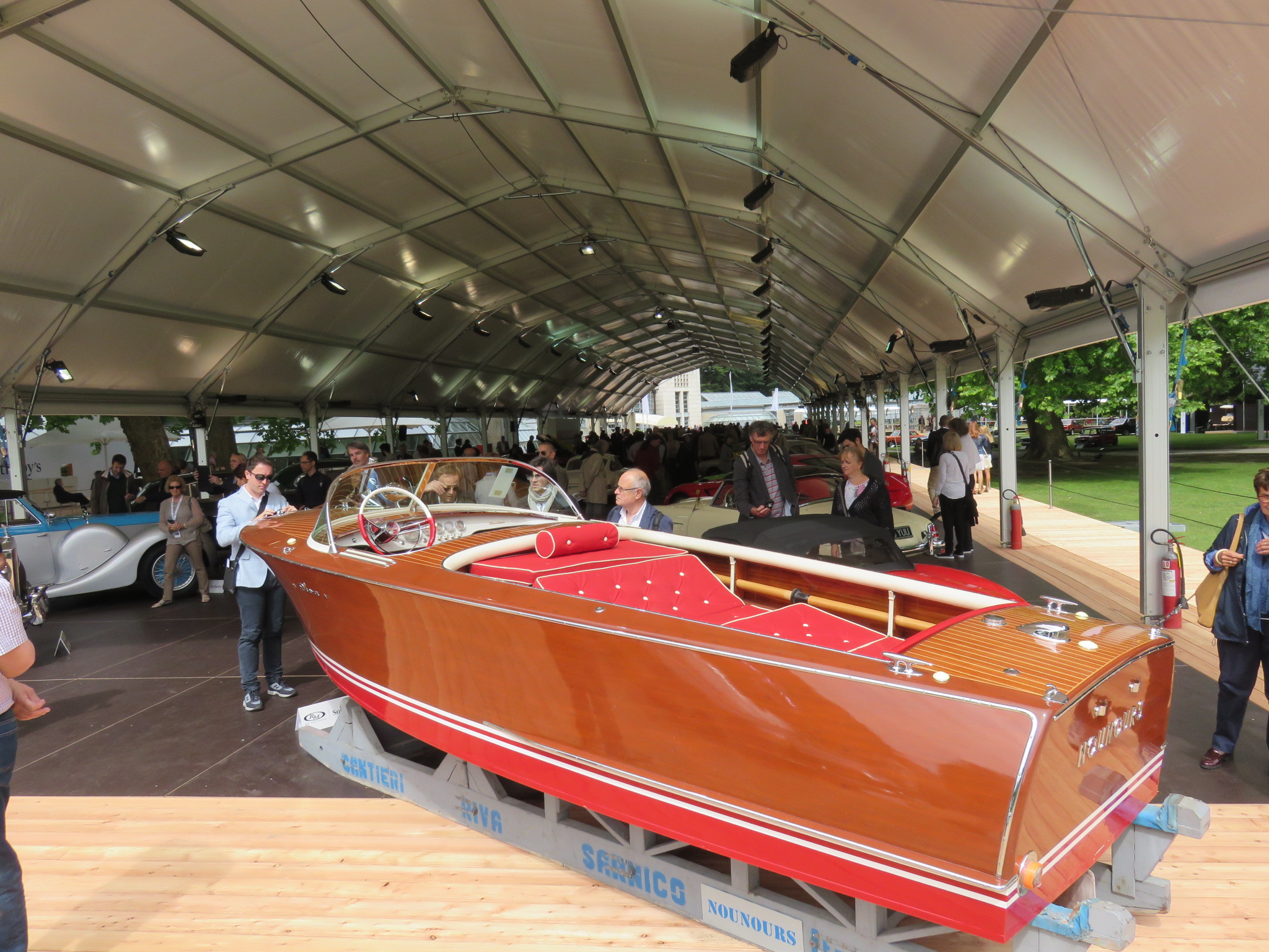 Riva Florida 1959, Concorso d'eleganza Villa d'Este 2015